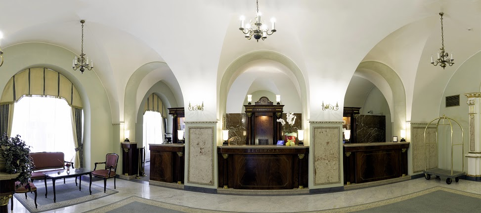 Recepcja Grand Hotel Kraków